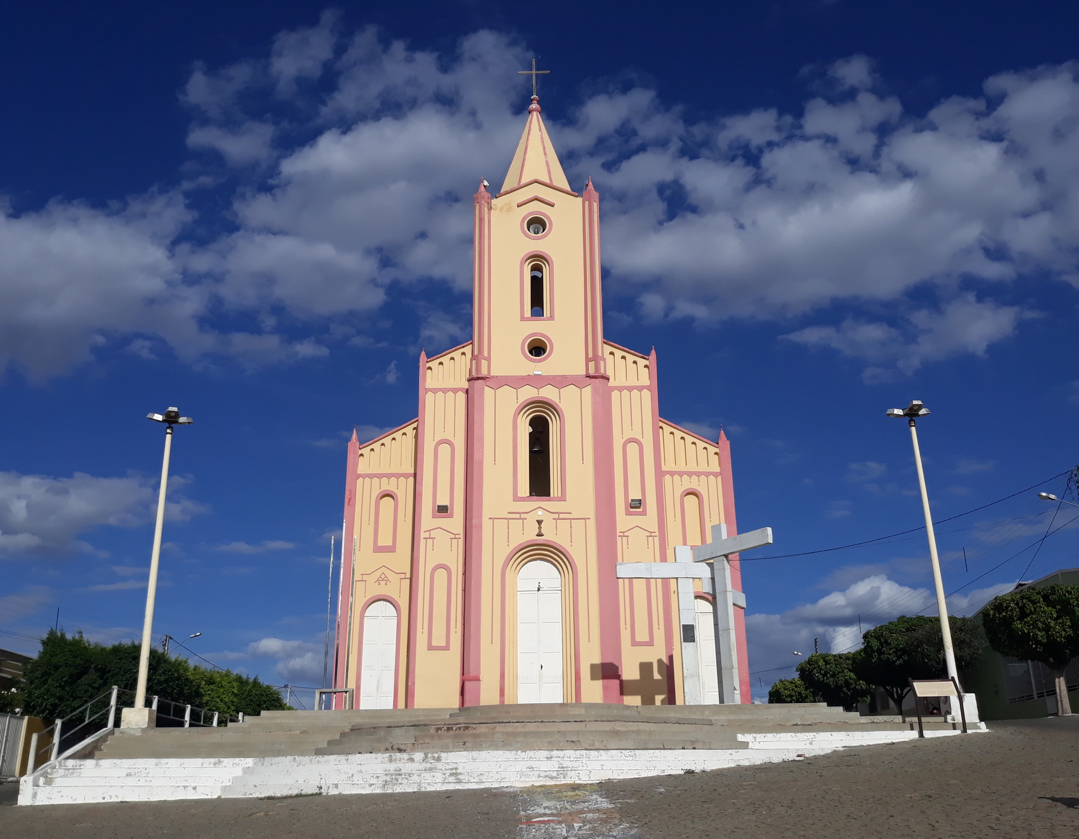 Igreja Matriz de Nossa Senhora da Conceição na cidade de Alexandria, no Rio Grande do Norte (Brasil)